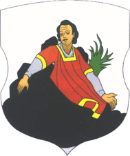 Herb miasta Radoszkowice